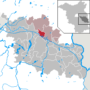 Berkenbrück in Brandenburg (Country) - District Oder-Spree